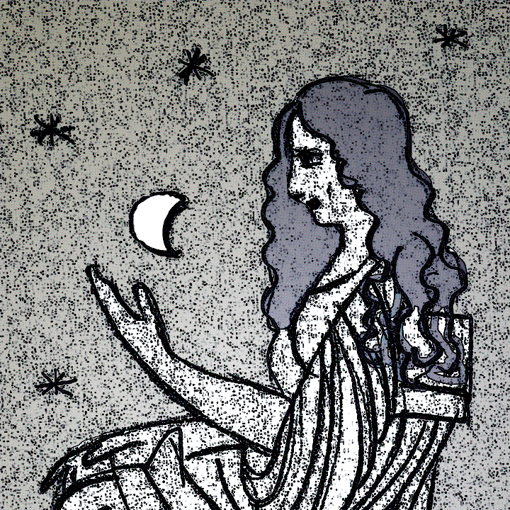 Aglaonice